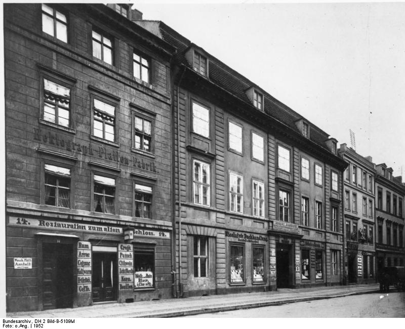 Berlin, Fassade Haus Brüderstr. 13 Berlin, Brüderstr. 13 Nikolai-Lessinghaus 1952 [Berlin.- Fassadenansicht des Hauses Brüderstr. 13, Nikolai-Lessinghaus]